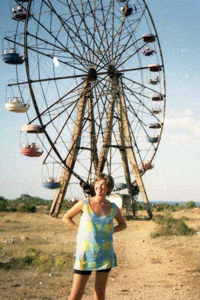 Второе в Севастополе колесо обозрения. Функционировало до начала 90-х. Позже было украдено.